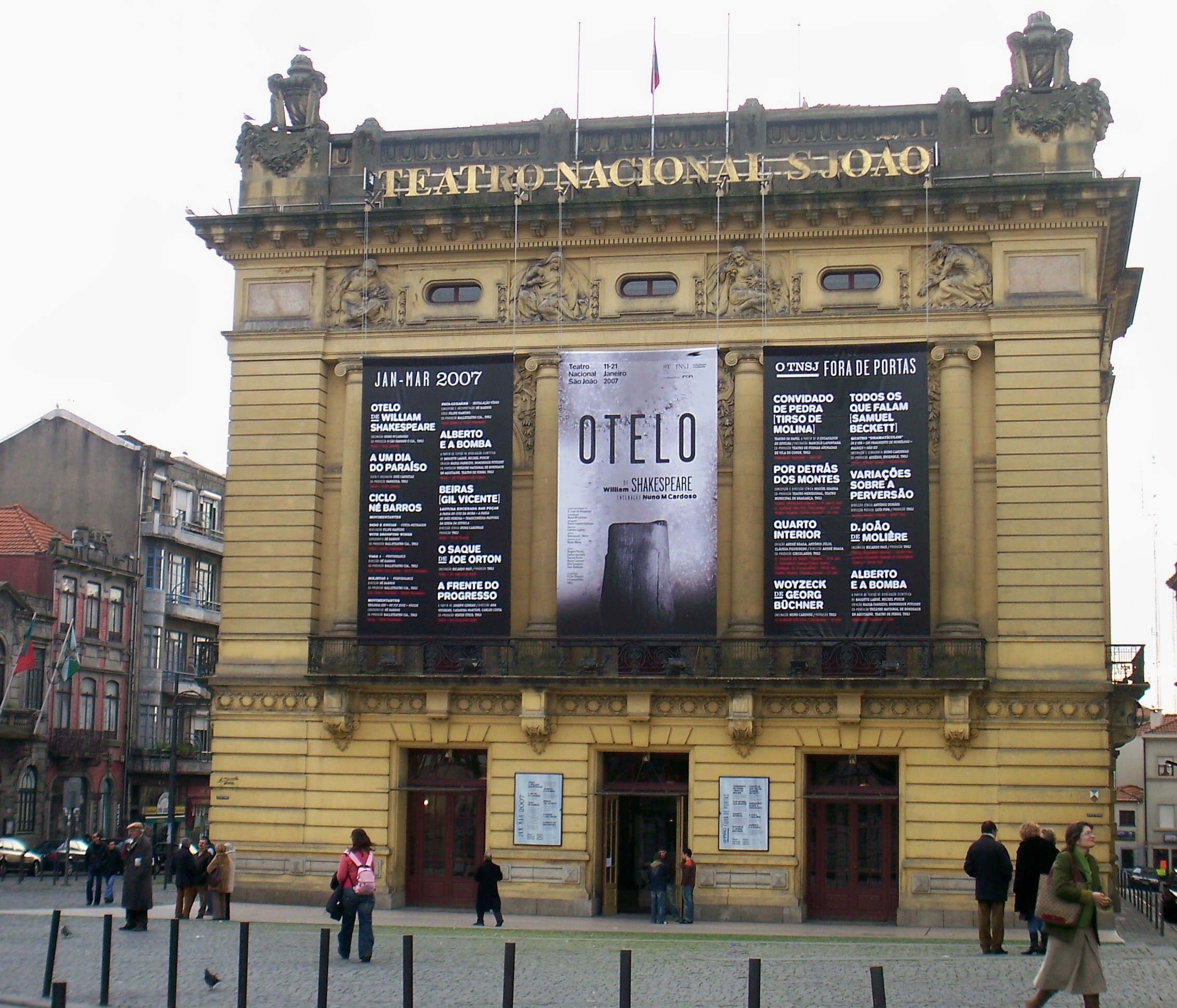 Porto